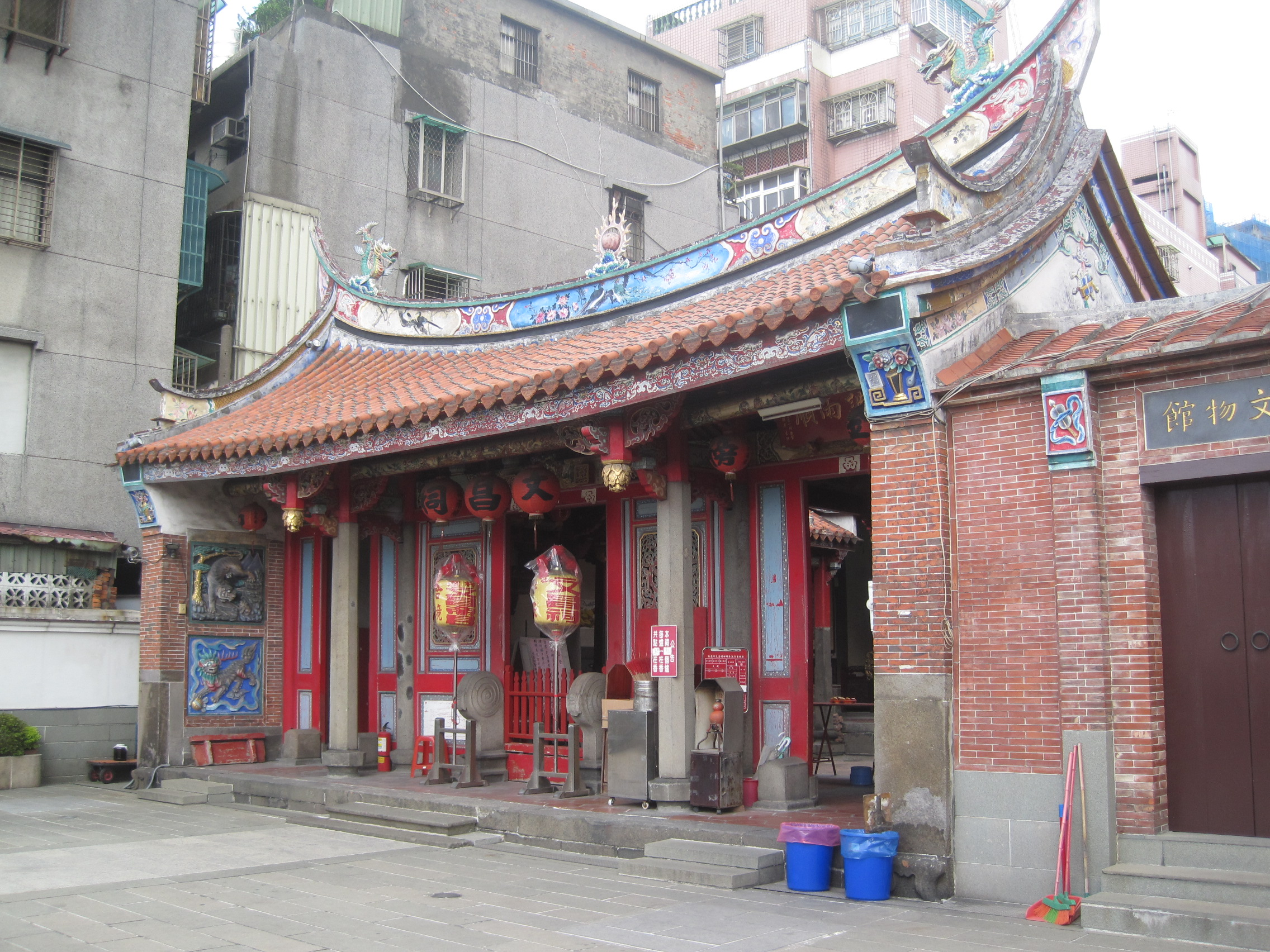 新莊文昌祠三川殿